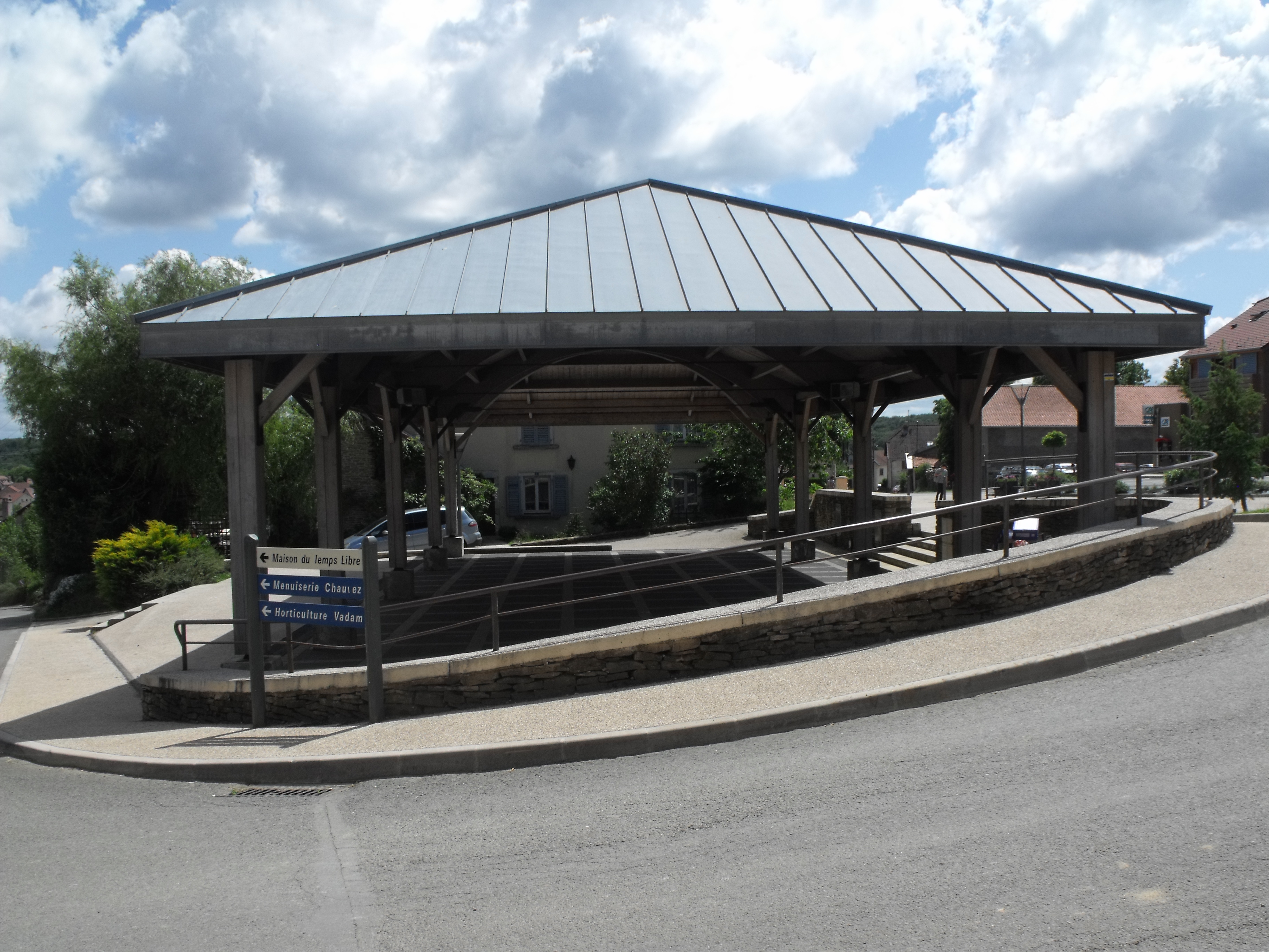 Halle à Montenois, Département du Doubs, France